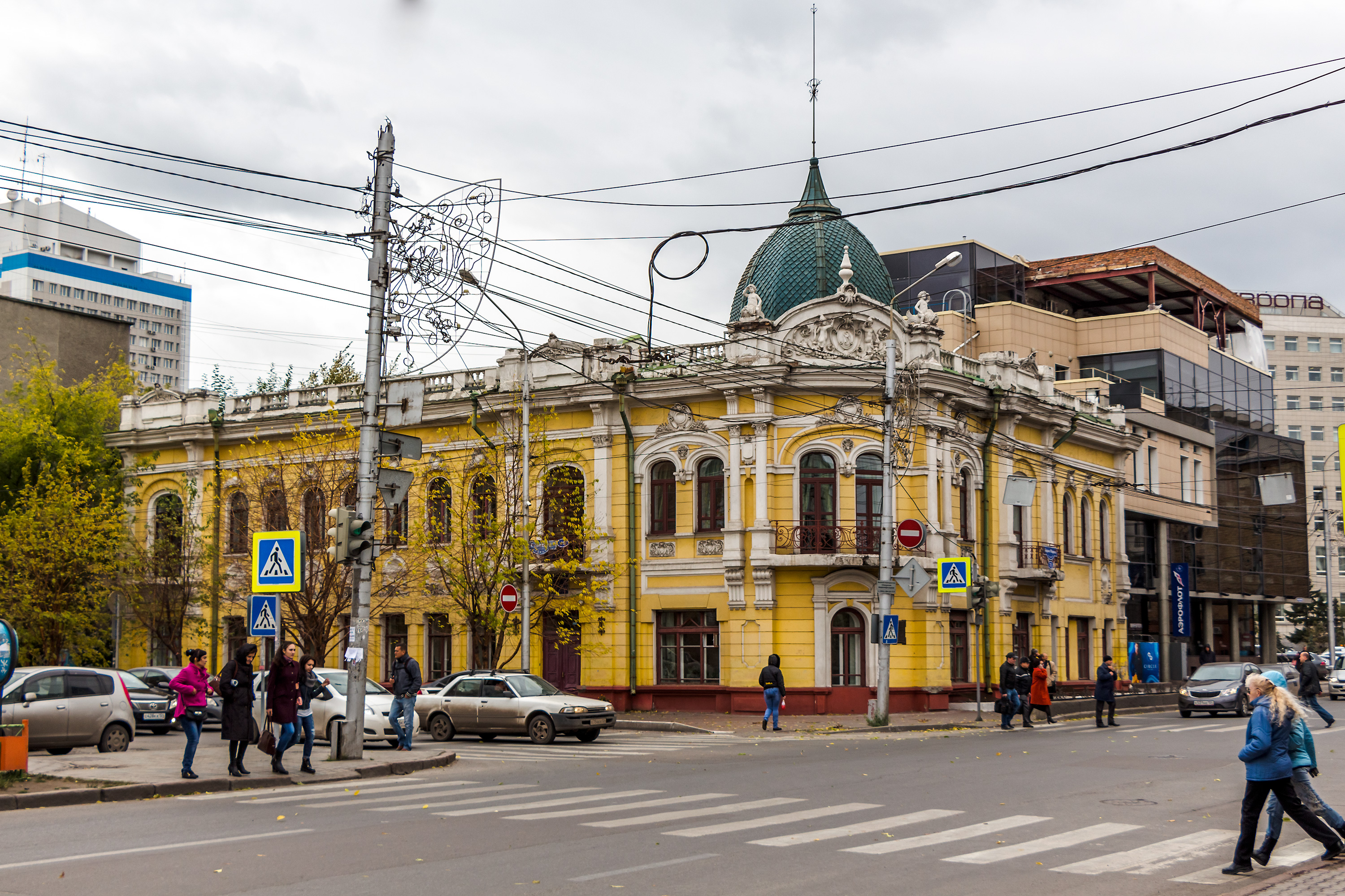 Дом Зельмановича: улица Карла Маркса, 73, Сурикова, 19, Красноярск, Красноярский край